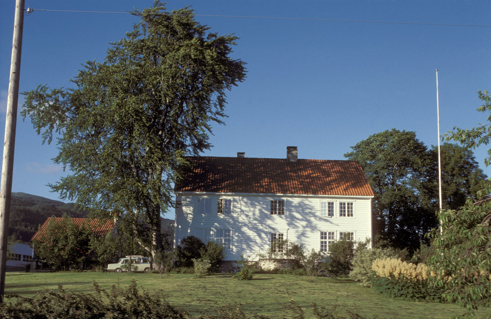 Volda prestegård. Foto: Ola Øgar Svendsen. Fra Riksantikvarens Kulturminnesøk.